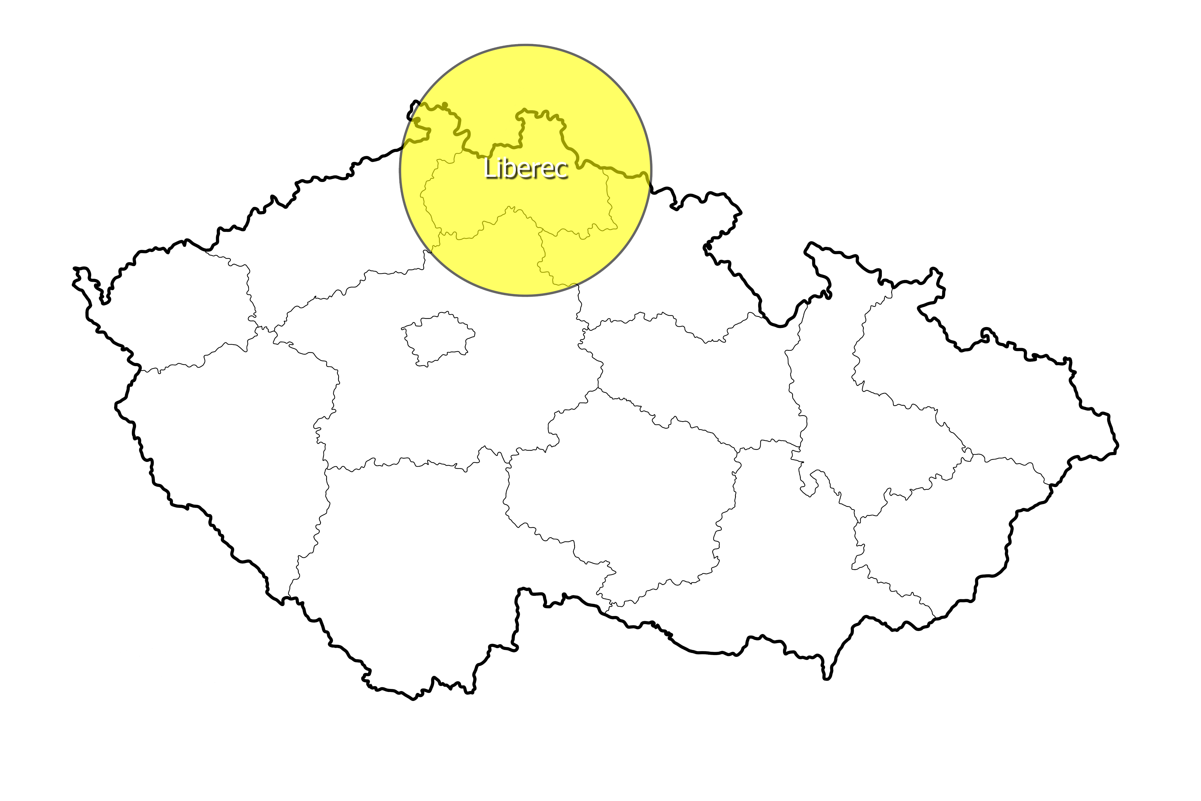 Poloha stanice letecké záchranné služby v Liberci